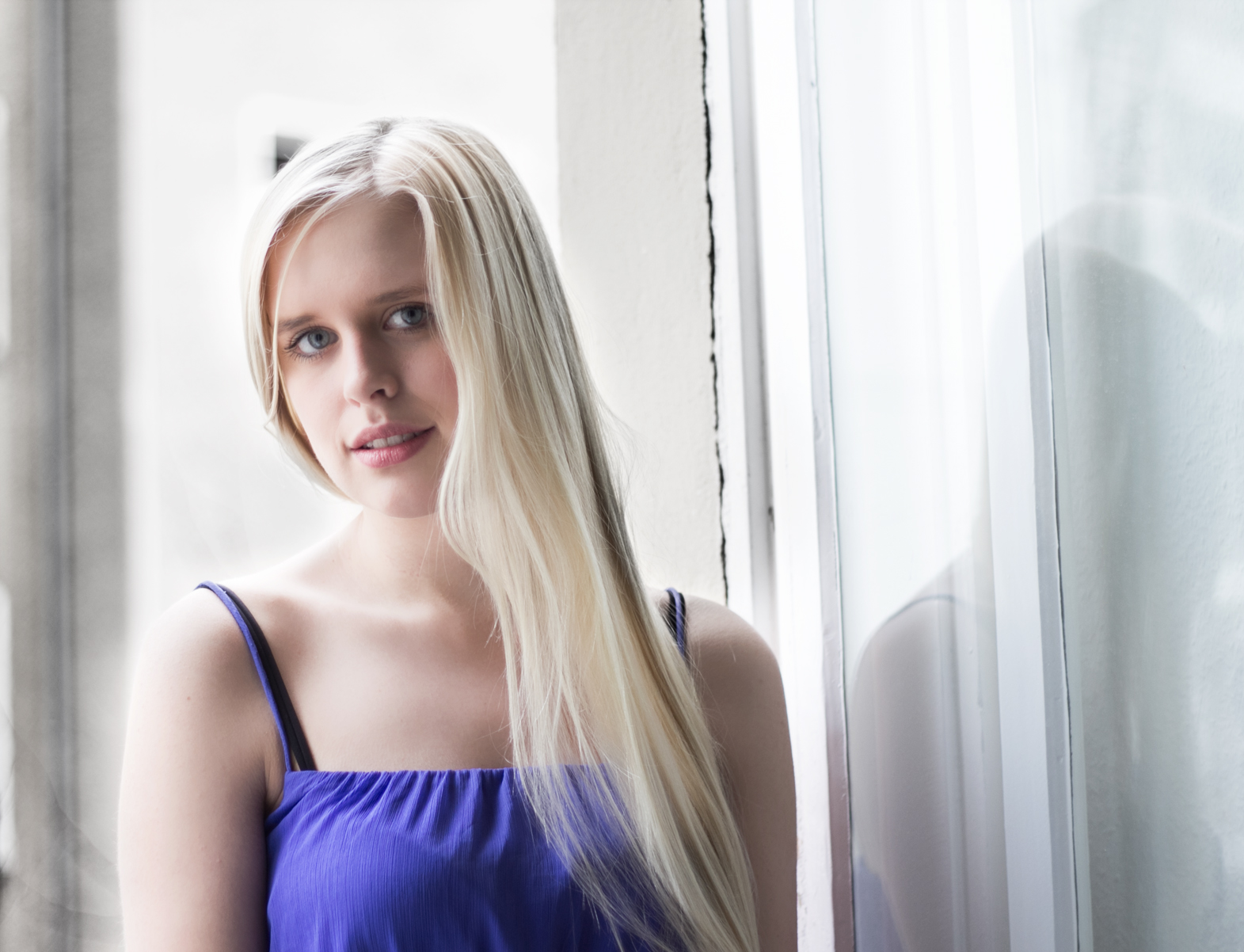 Jungschauspielerin Hanna Scholz (z.B. Hotel 13) beim Fotoshooting